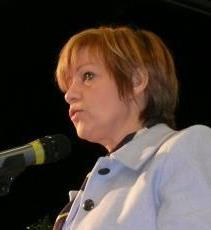 Portrait de Betty Weiss secrétaire générale de la Fédération sportive et culturelle de France (2002-2009)